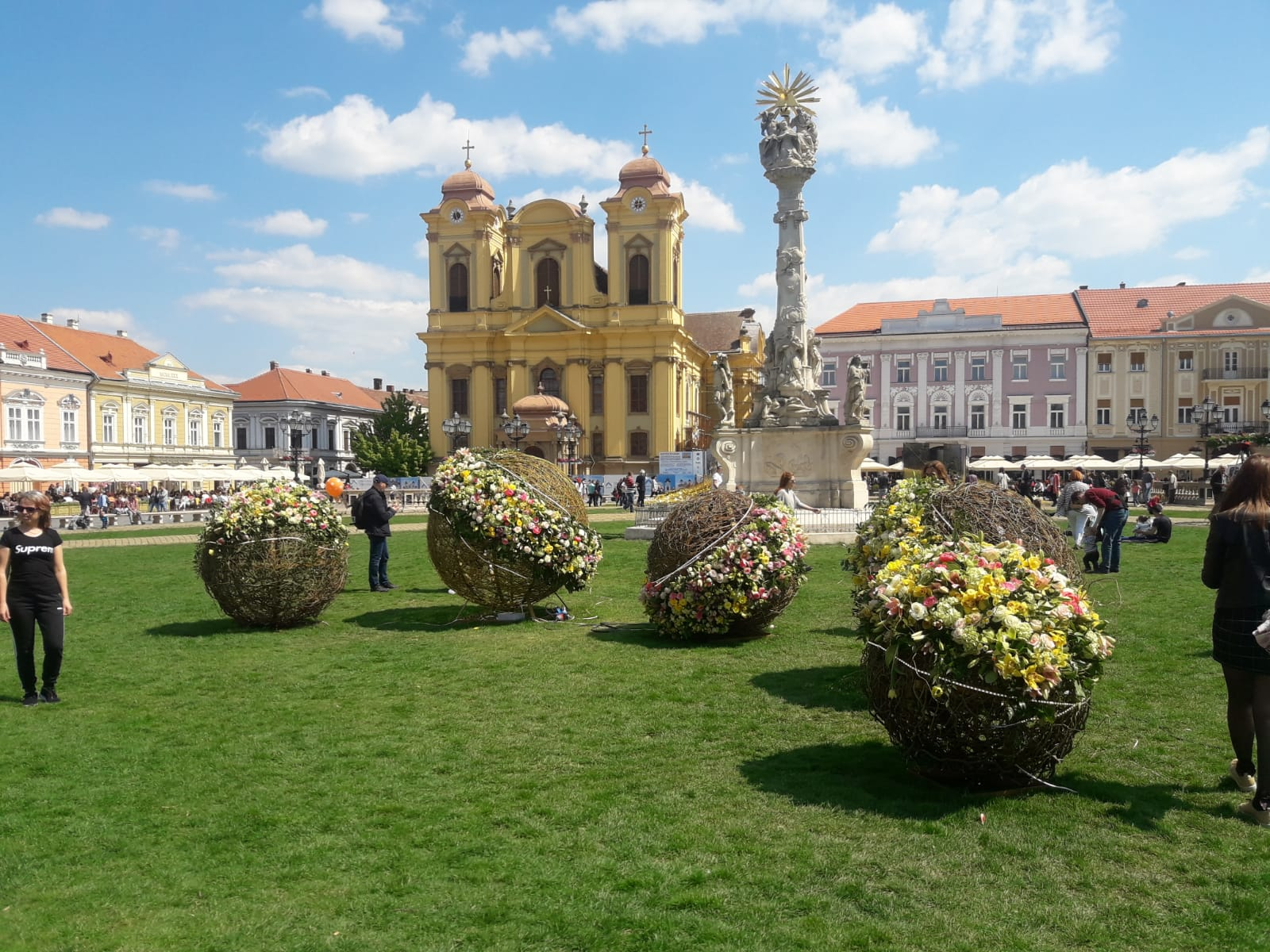 Decorațiuni florale în Piața Unirii din Timișoara